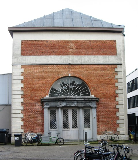 Antwerpen Mutsaardstraat 31 Armenschool